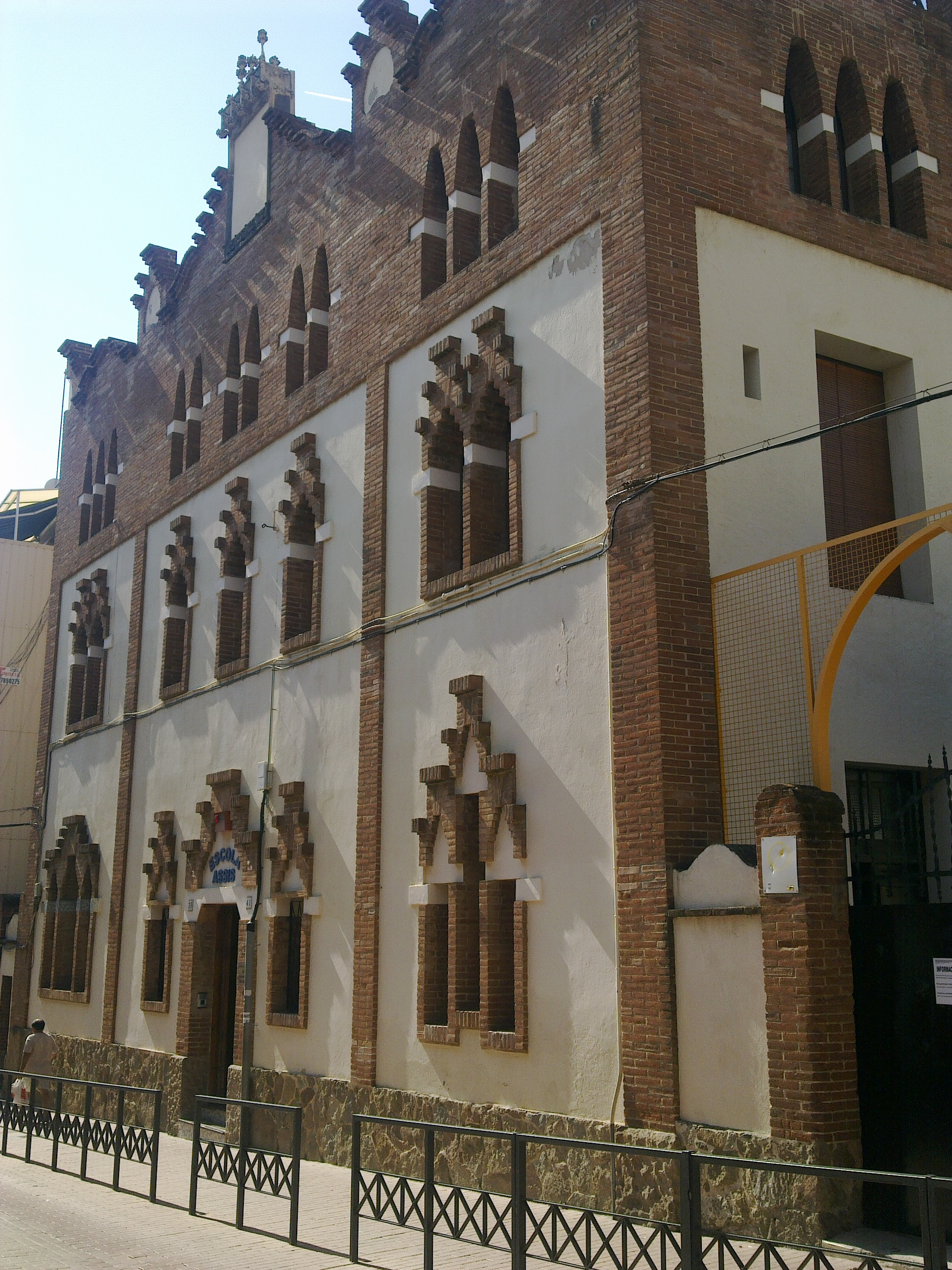 Escola Assís, Premià de Mar, Maresme